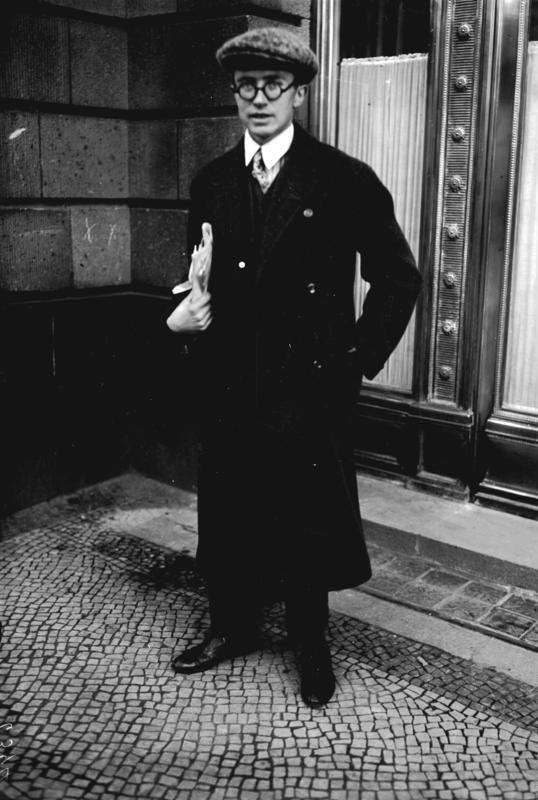 Der bekannte Dichter Klabund ist im Alter von 37 Jahren gestorben! Unser Bild zeigt den bekannten Dichter Klabund, welcher nach längerer Krankheit an Tuberkulose im Alter von 37 Jahren in Davos gestorben ist.